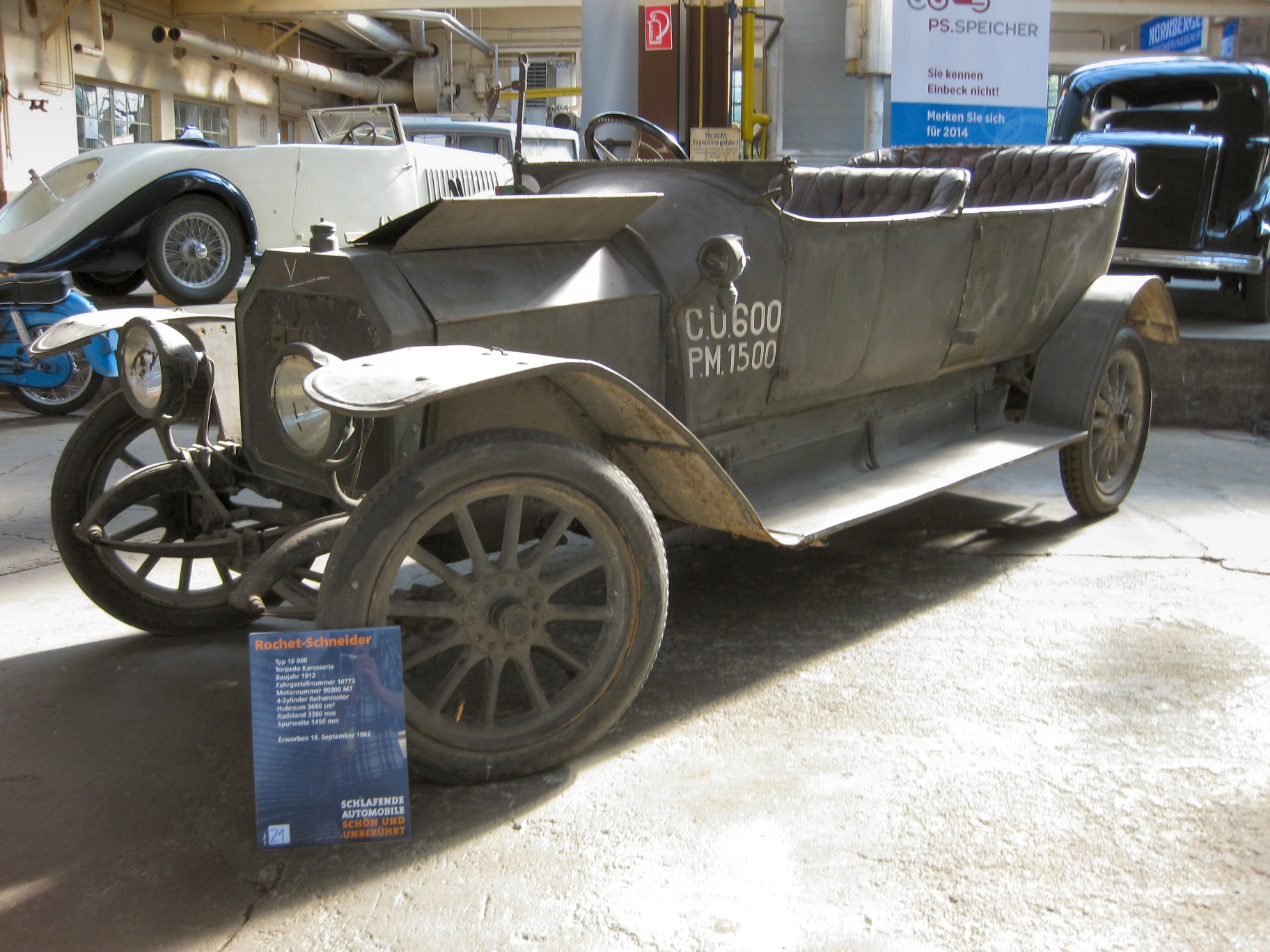 Rochet-Schneider 10.000 (Country of origin: France) aus Schlumpf-Sammlung